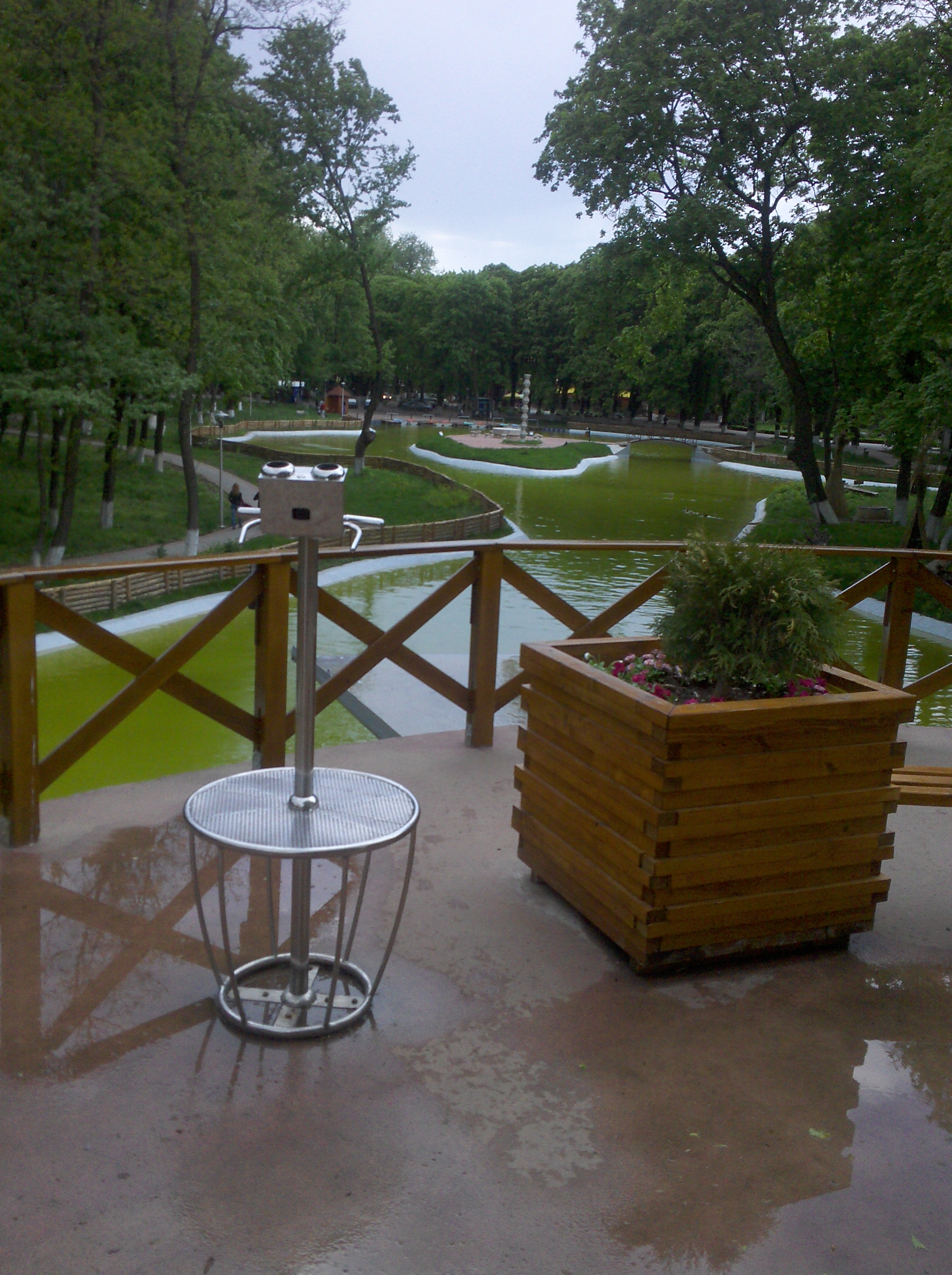 l'obsevatori de Roman